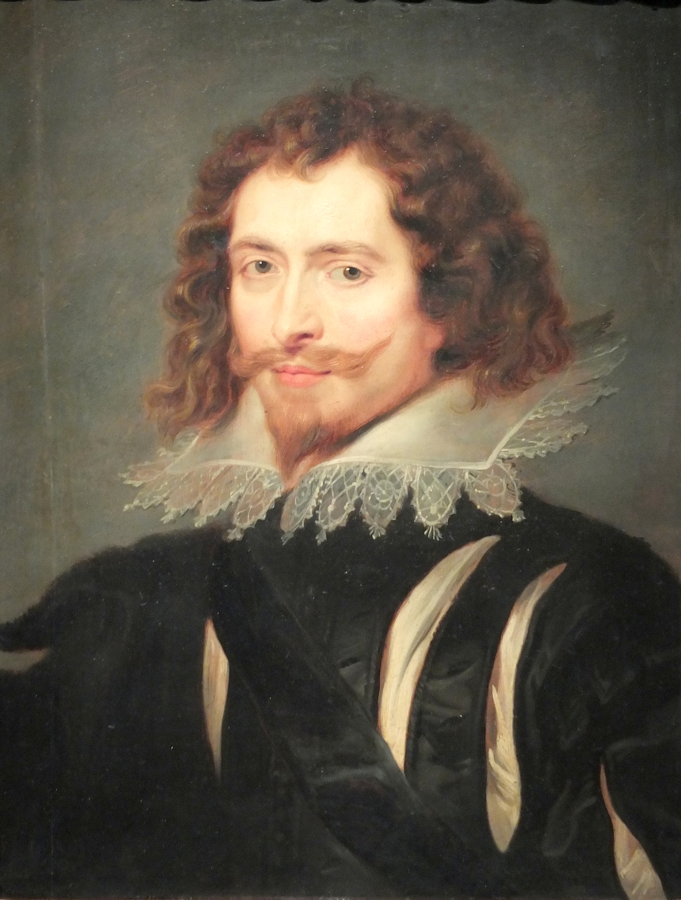 Portait de Georges Villiers, Ier duc de Buckingham. Atelier de Pierre-Paul Rubens, vers 1625. Exposition Les Mousquetaires, musée de l'Armée, Paris mai 2014. Florence, musée du Palais Pitti.